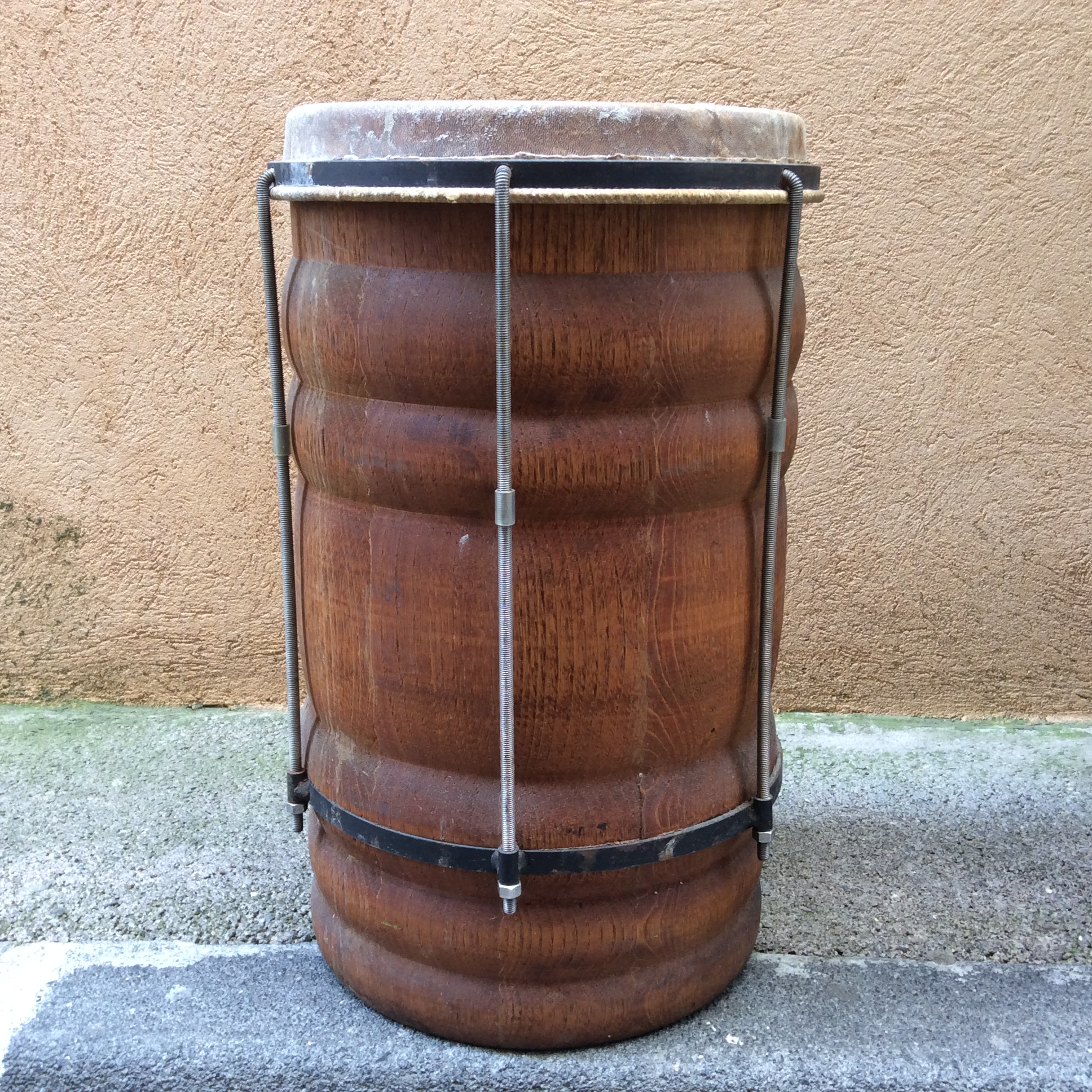 Tambour nyabinghi artisanal, en lamellé collé, tourné, peau de chèvre avec un système de tige fileté pour la tension. Vue de côté.